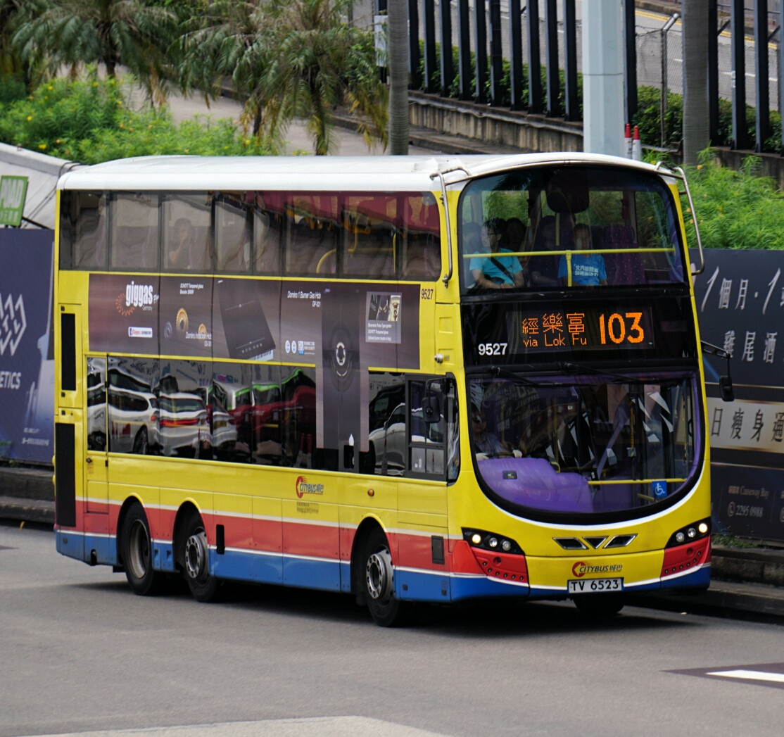 中文（香港）: 過海隧道巴士103線，剛駛出紅磡海底隧道